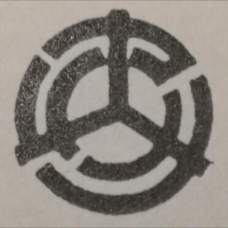 2004年に合併により廃止された弥栄町（現・京丹後市弥栄町）の町章